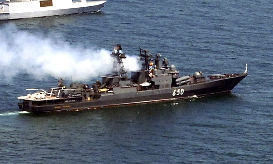 Большой противолодочный корабль «Адмирал Чабаненко»